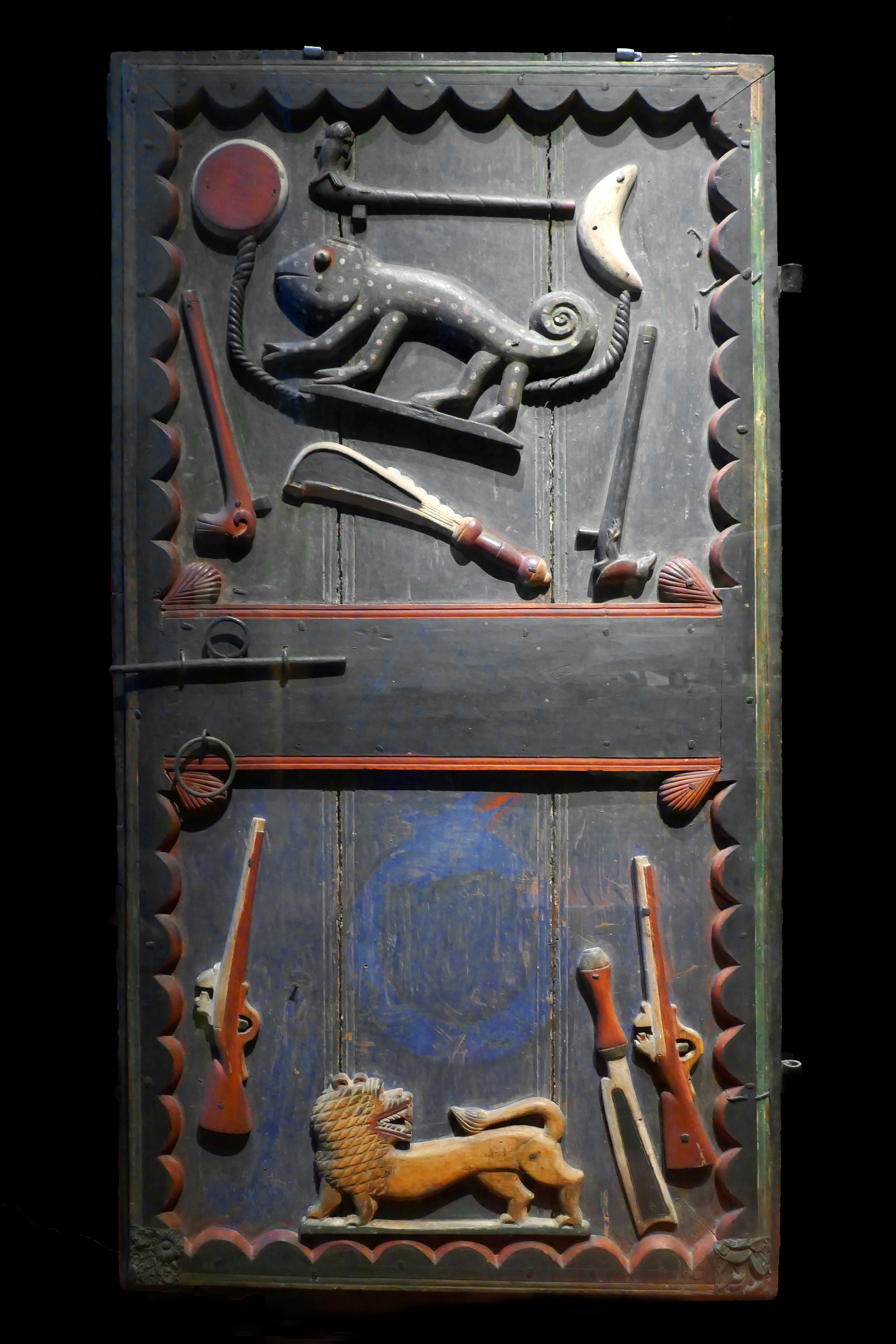 Porte du palais royal d'Abomey Atelier Sossa Dede Date : vers 1889 Bois polychrome, pigments, métal L'une des 4 portes exposées au musée du Quai Branly. N° d'inventaire : 71.1893.45.7